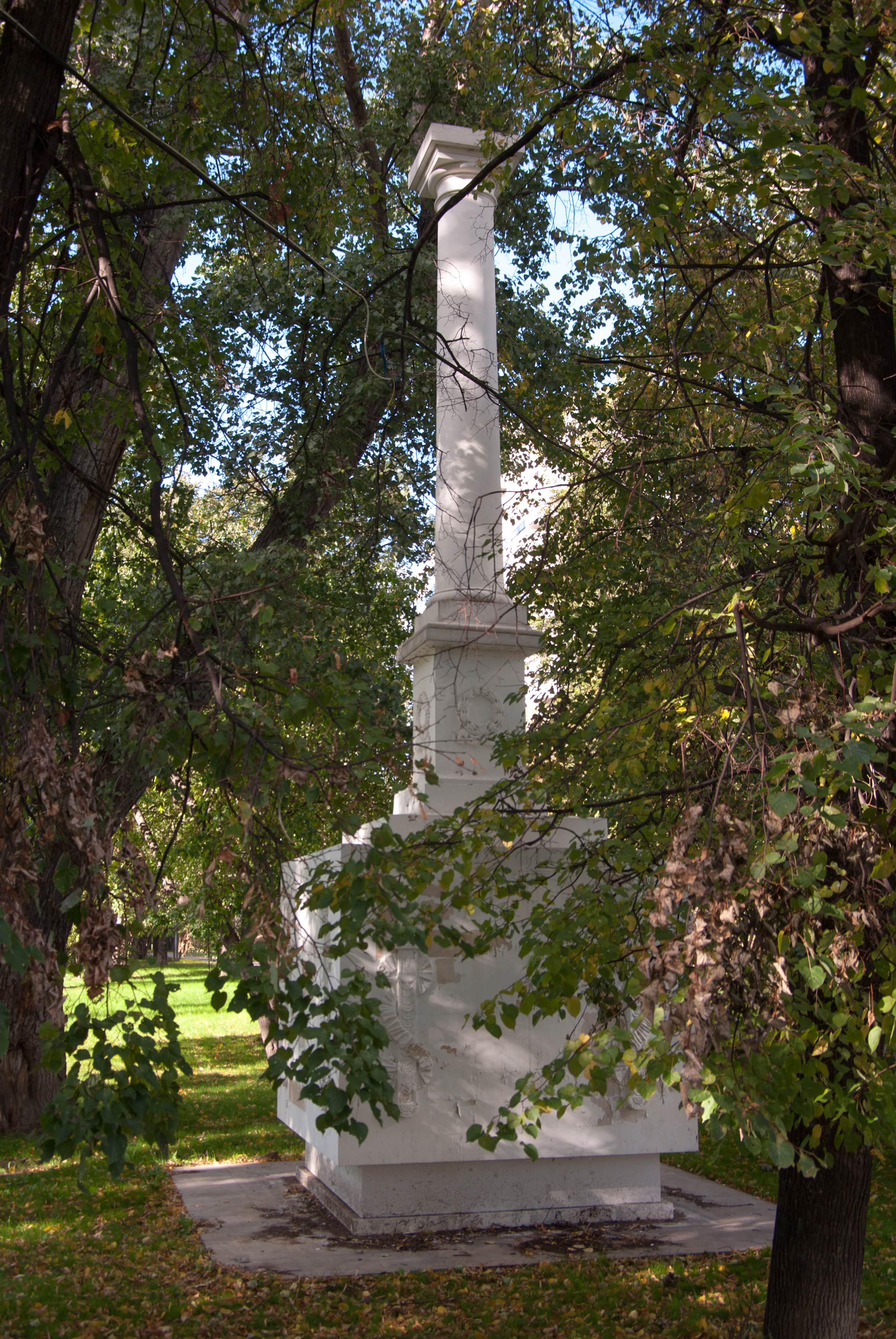 Обелиск был установлен генерал-губернатором Москвы Арсением Закревским в 1820-х годах рядом с его усадьбой "Студенец". Верхушку колонны венчала статуя Славы, в настоящее время утраченная. Реставрационные работы запланированы на 2012-2013 годы.